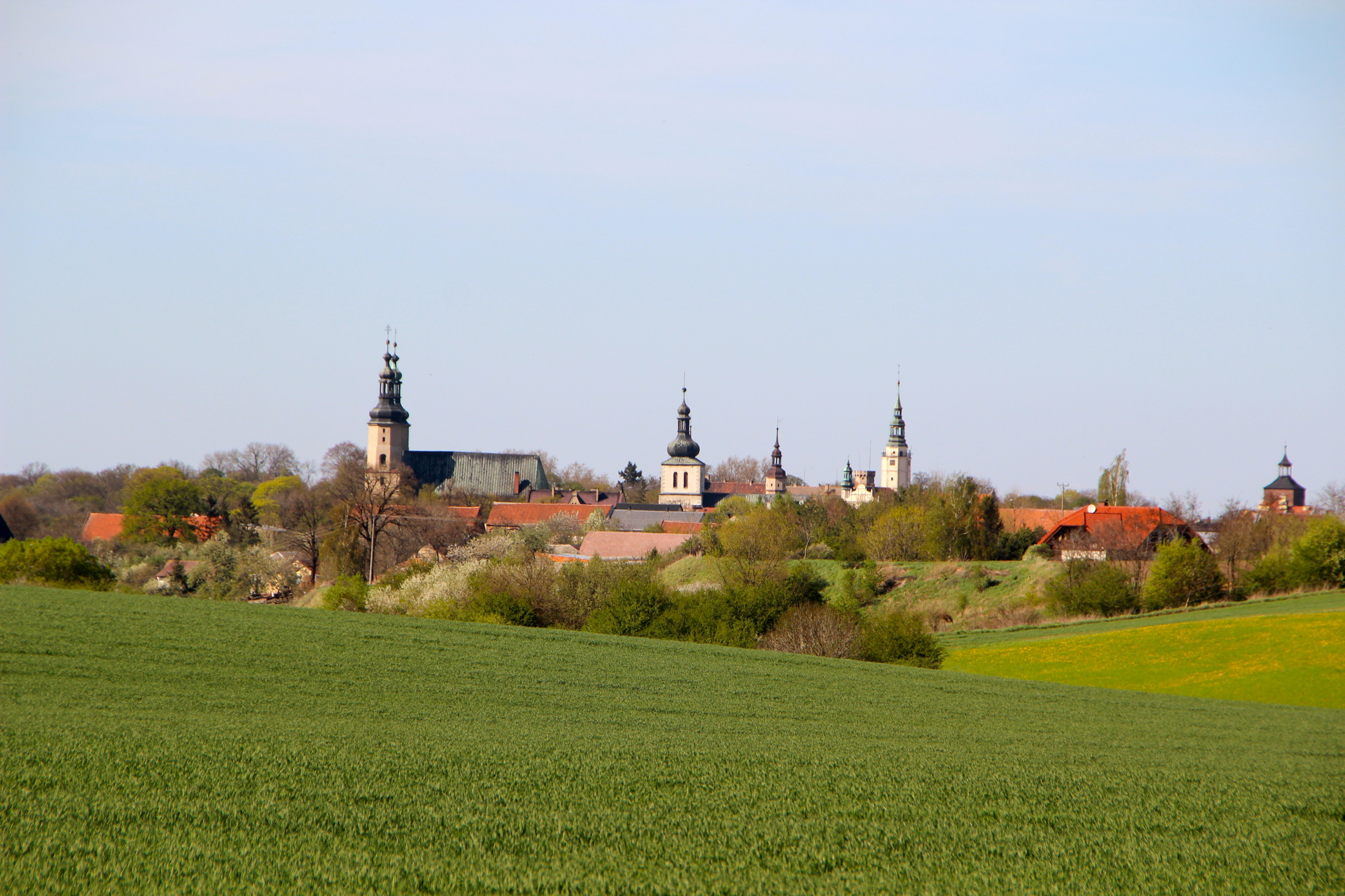 Panorama Głogówka (dodatkowa nazwa w j. niem. Oberglogau) – miasto w Polsce położone na Górnym Śląsku, w województwie opolskim, w powiecie prudnickim.